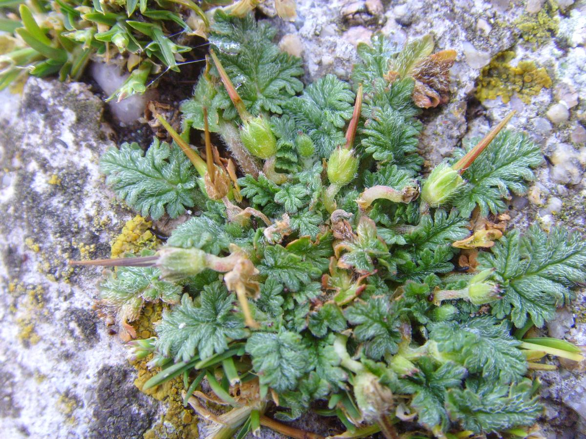 Erodium maritimum, feuilles et fruits, île de Beniguet, Le Conquet, Finistère, Bretagne, France